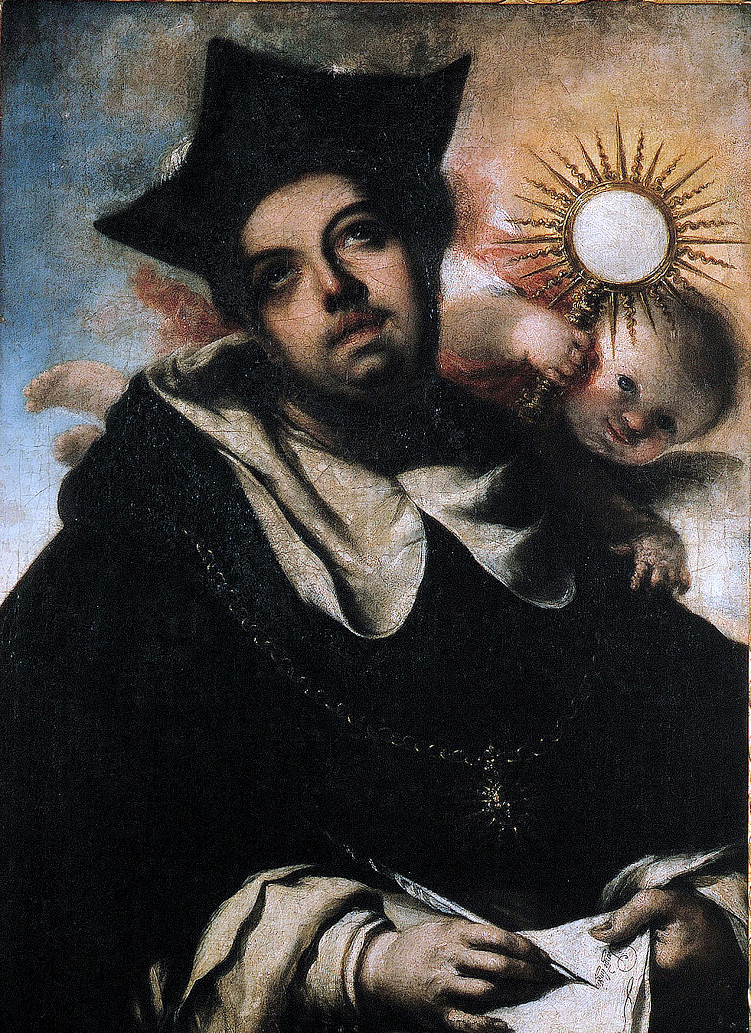 La obra representa al insigne teólogo dominico Santo Tomás de Aquino.